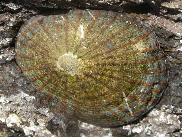 マツバガイ, 長崎市柿泊 (Cellana nigrolineata, Kakidomari, Nagasaki)